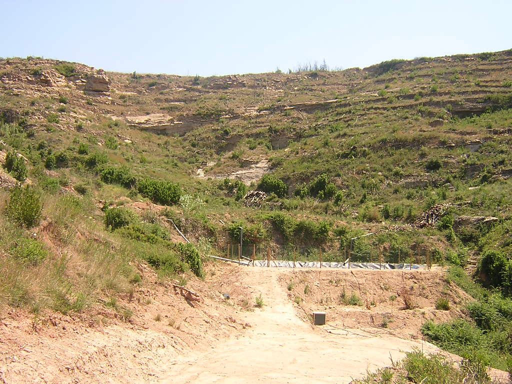 L'Hort de l'Om (Monistrol de Calders, Moianès)